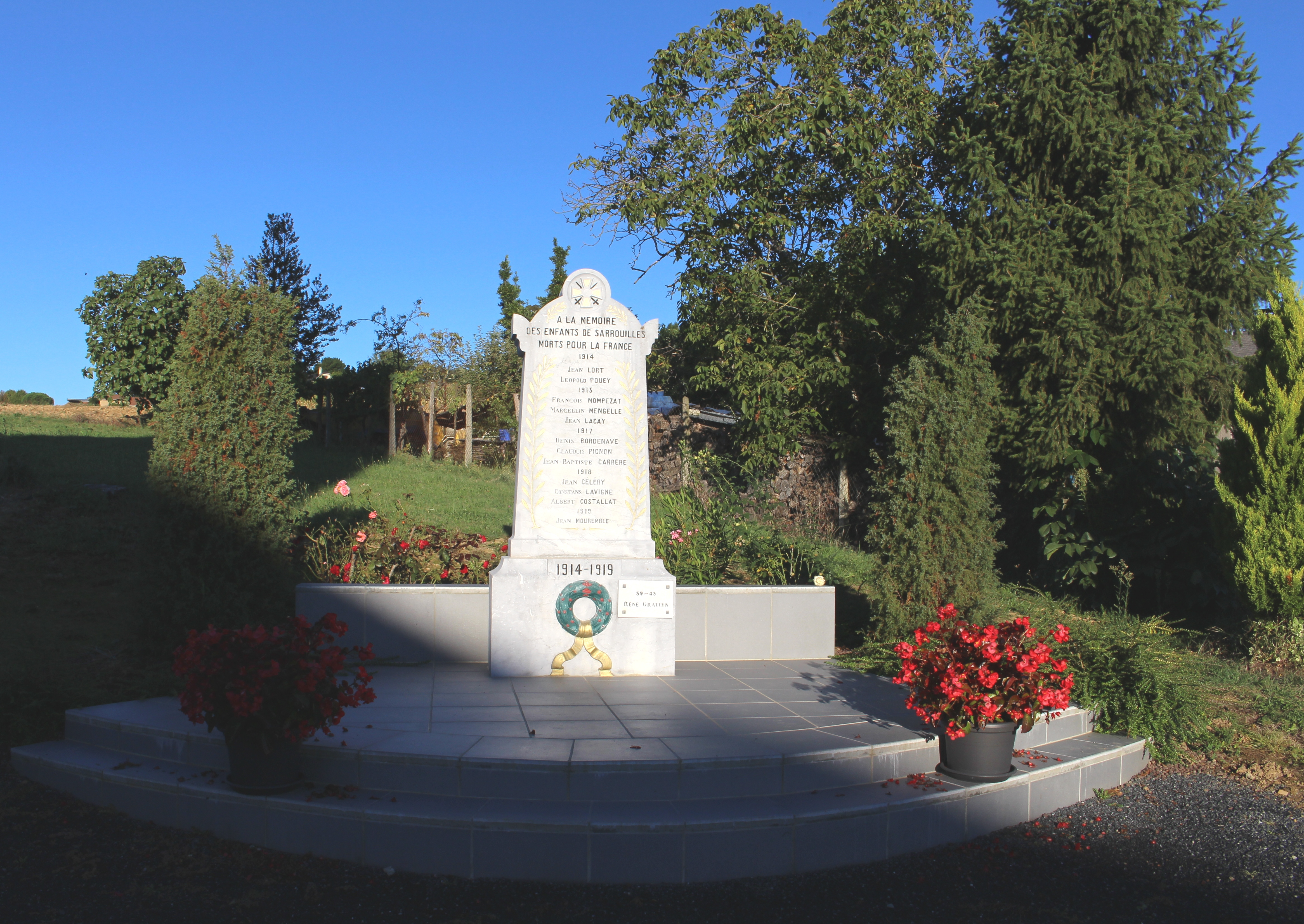 Monument aux morts de Sarrouilles (Hautes-Pyrénées)